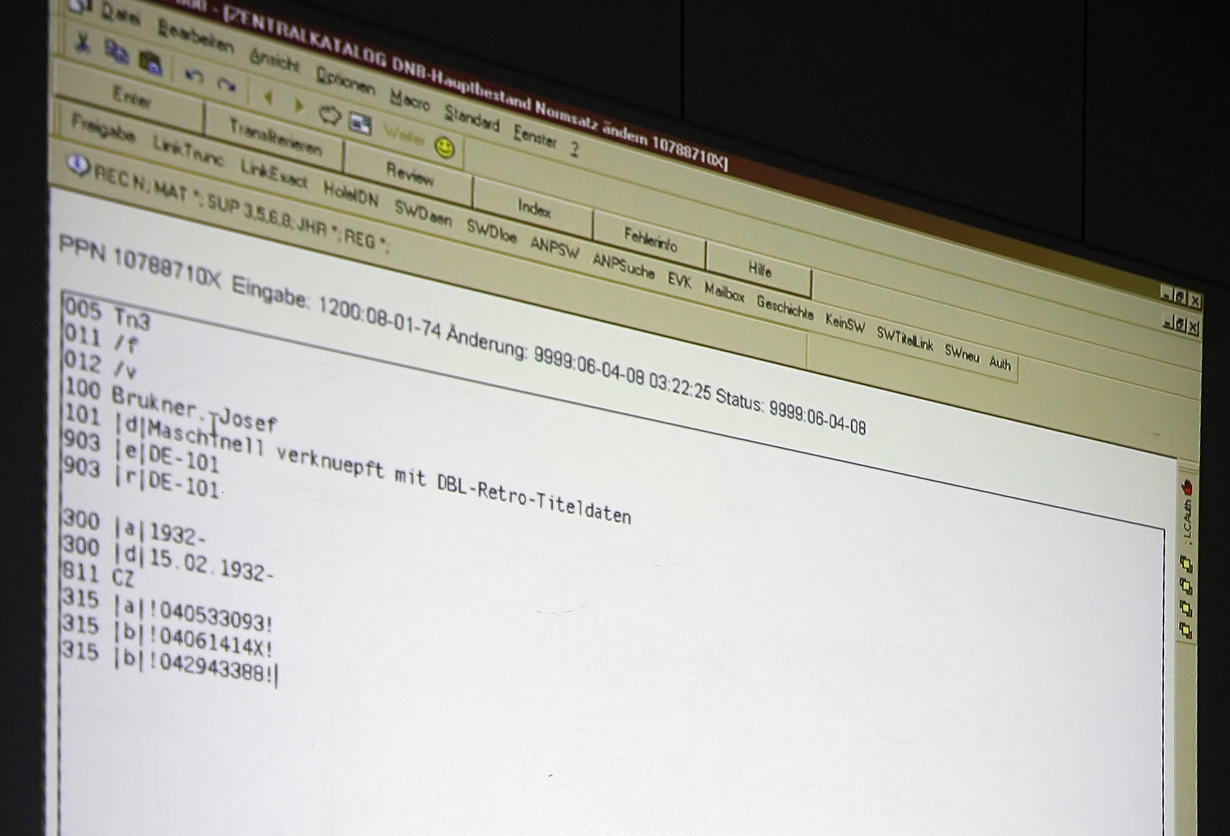 Informationsbesuch von Wikipedianern in der PND-Redaktion der Deutschen Nationalbibliothek